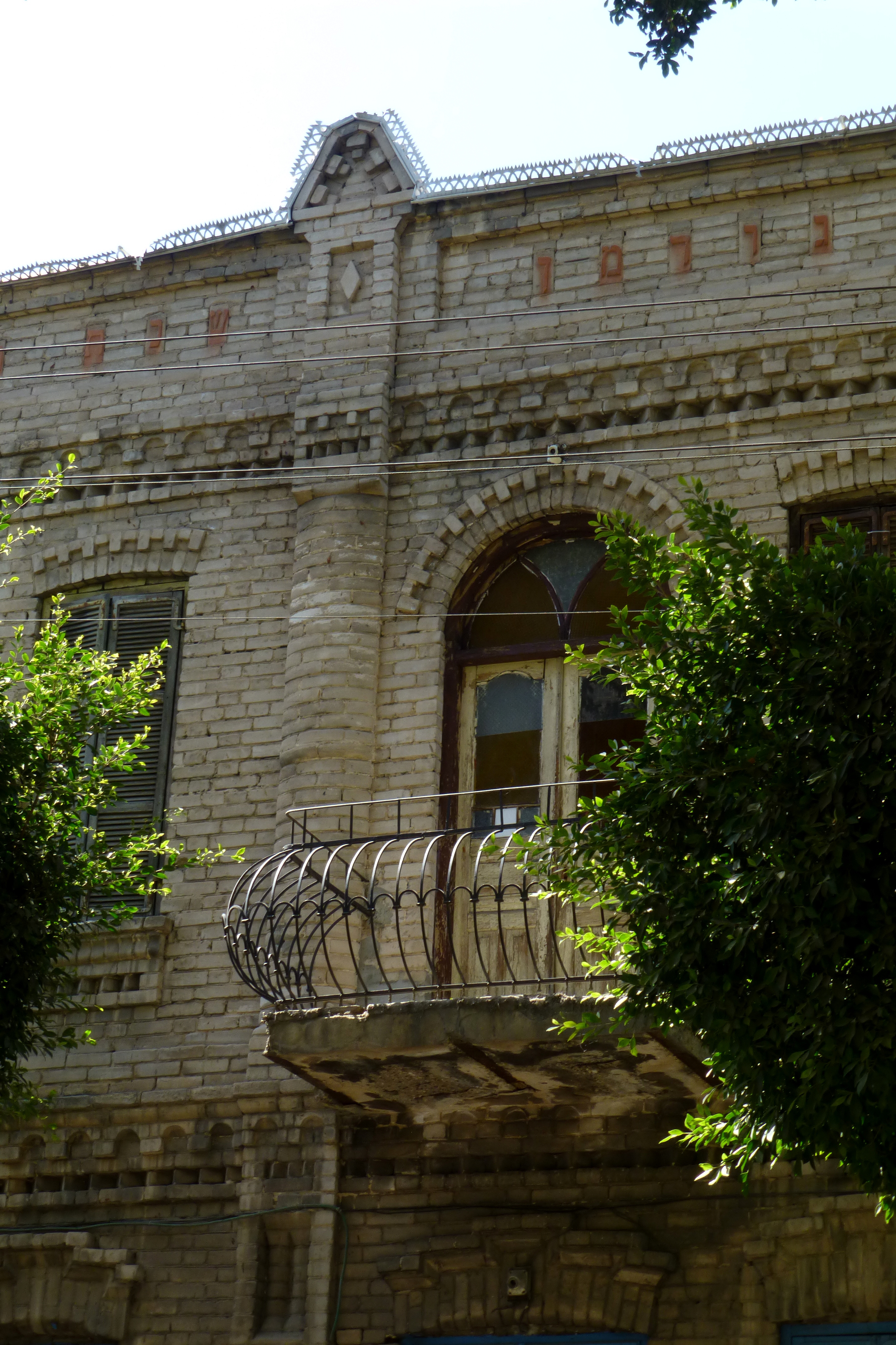 הבית, על חלקה של גודמן, נבנה בדגם בתים דומים בפולין על ידי מרדכי רוטברד ובניו.